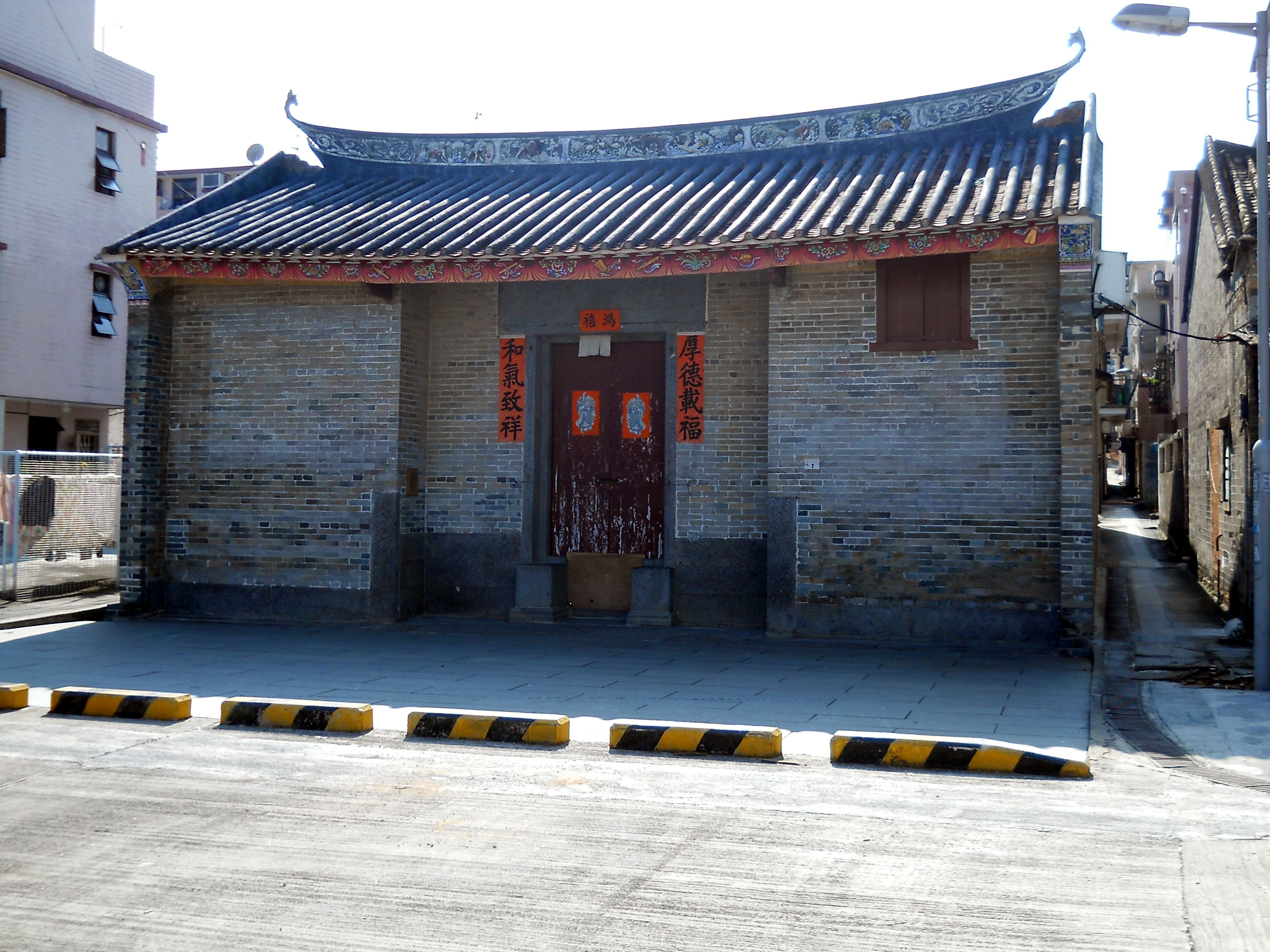 中文（香港）: 味峰侯公祠